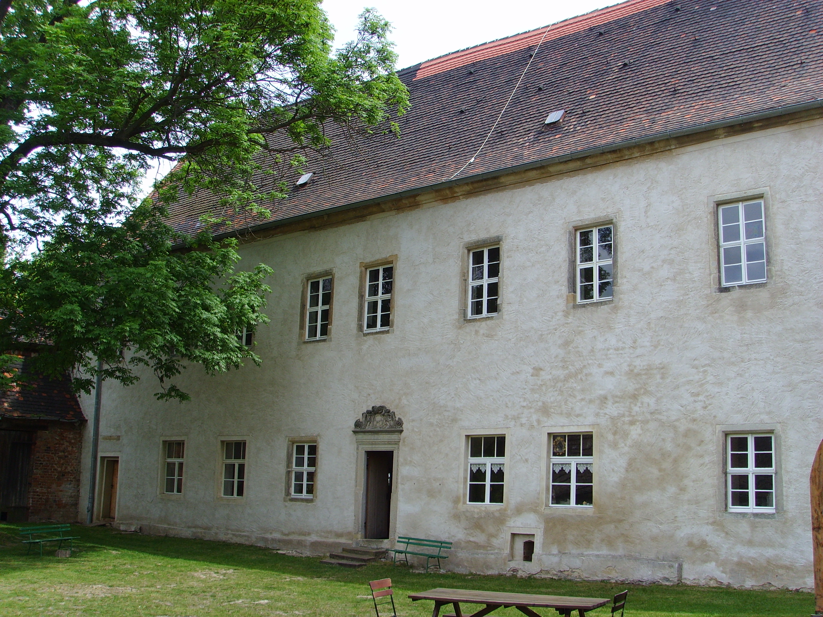 Nebengebäude Burg Klöden in Klöden, Ortsteil der Stadt Jessen (Elster)